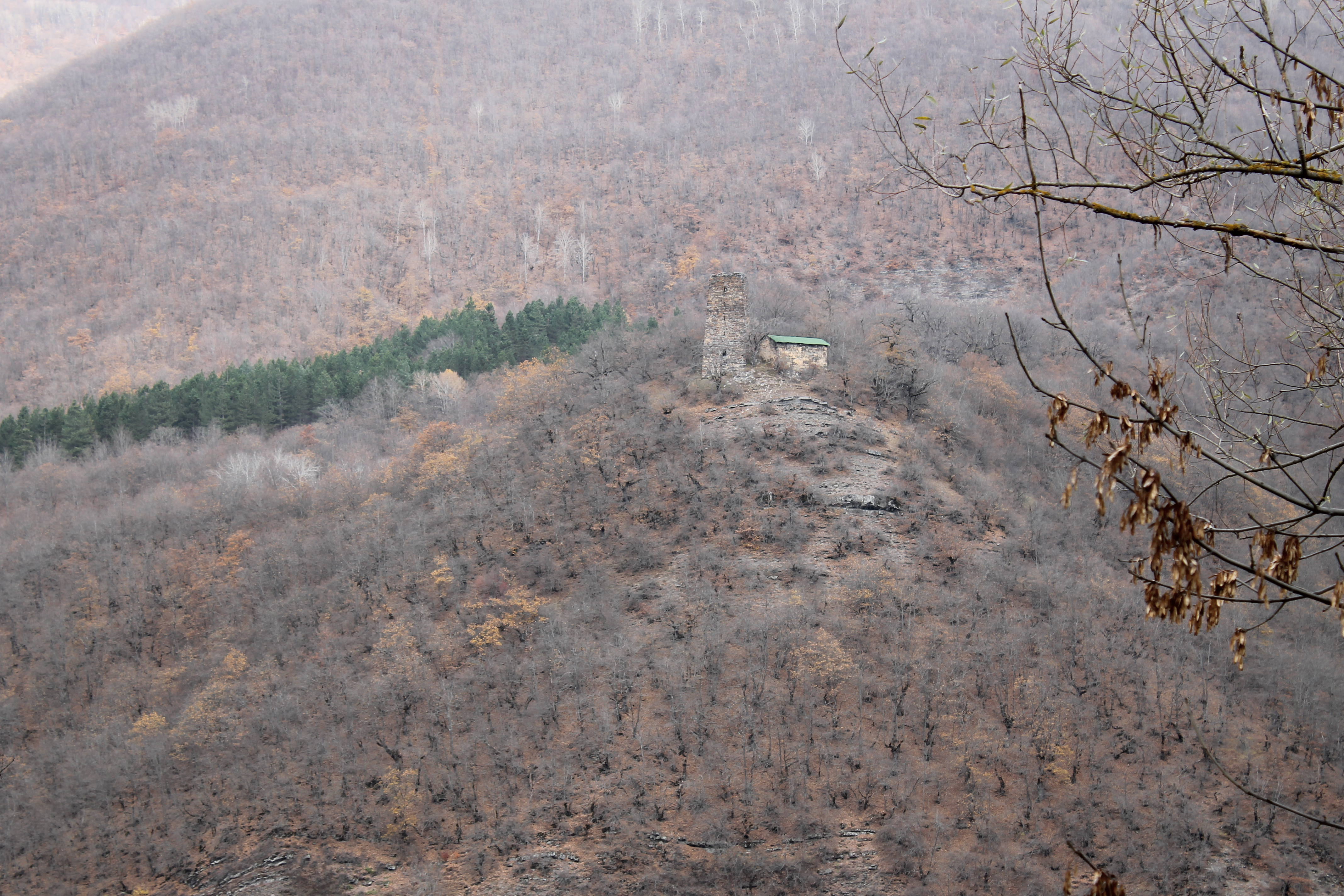 „წინკიბის“ ანსამბლის წმ. ბარბარეს ეკლესია